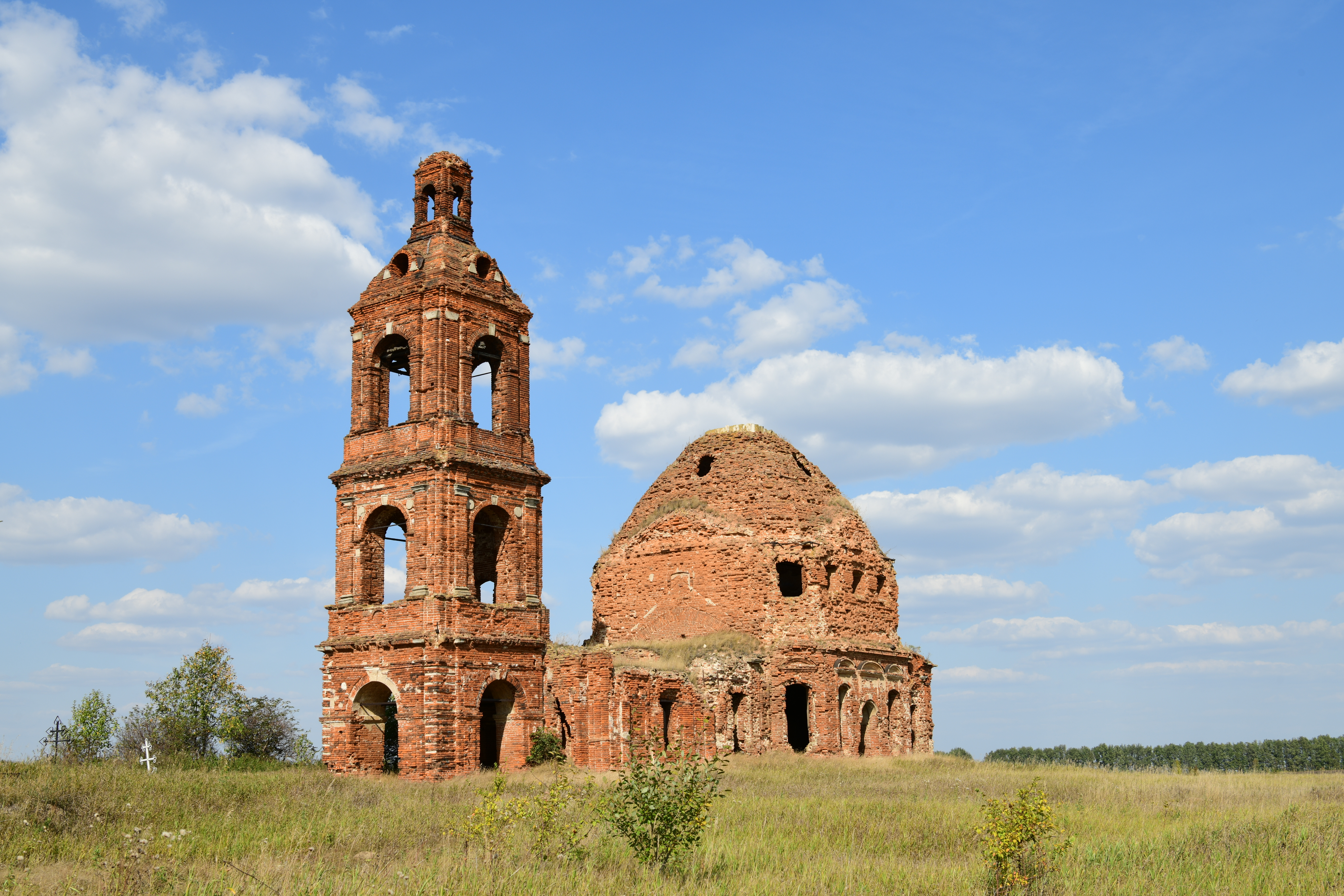 Церковь Воскресенская: Новое Киркино (с. Волынщина), Михайловский район, Рязанская область